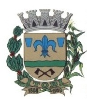 brasão de Itobi